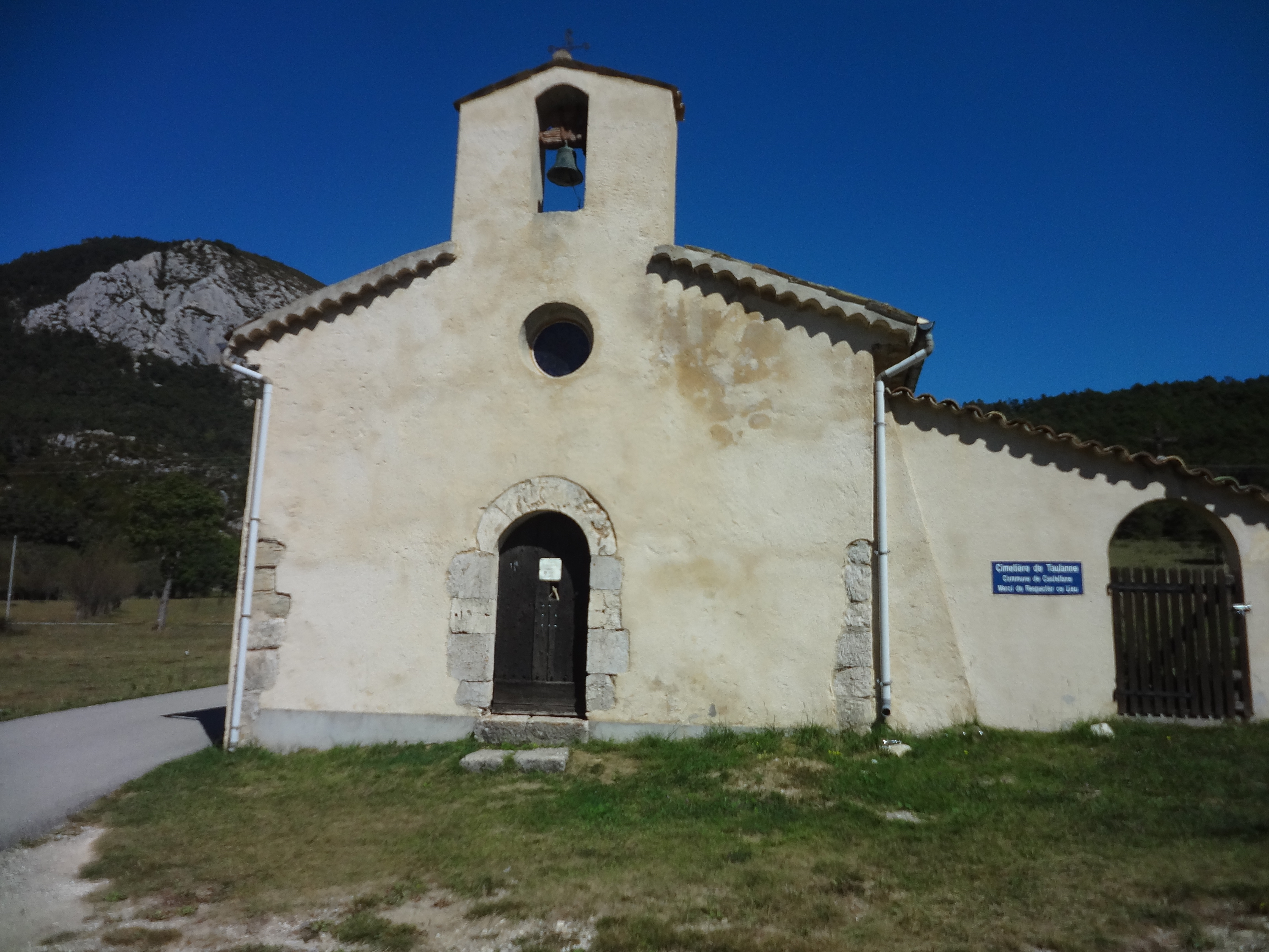 église Saint-Pierre de Taulanne à Castellane, à environ 1050 m d'altitude